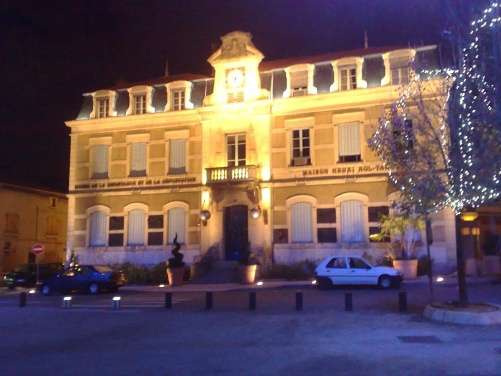 Ancienne mairie de Vénissieux